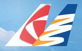 vizualizace spojení skupiny